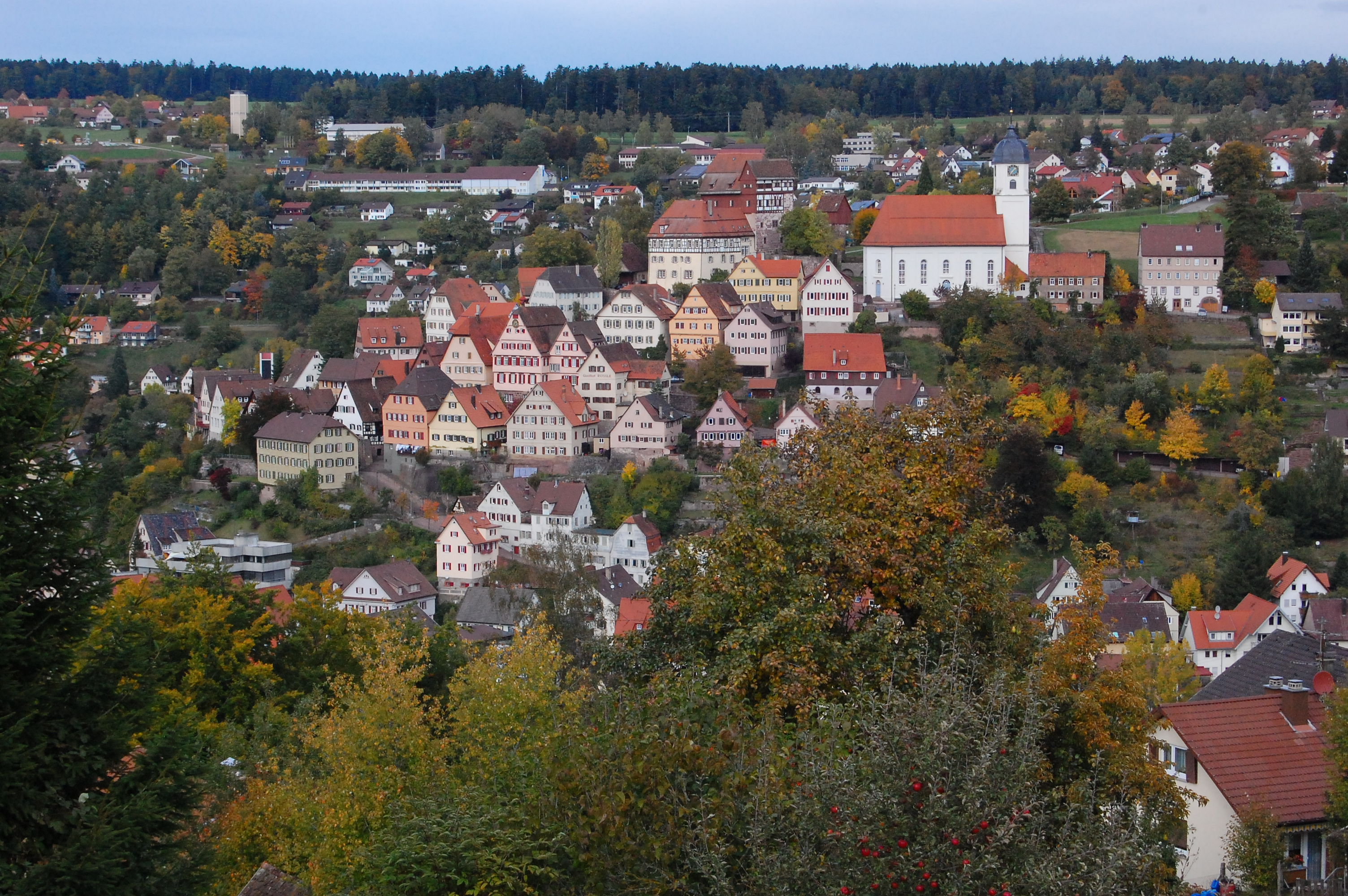 Altensteiger Altstadt